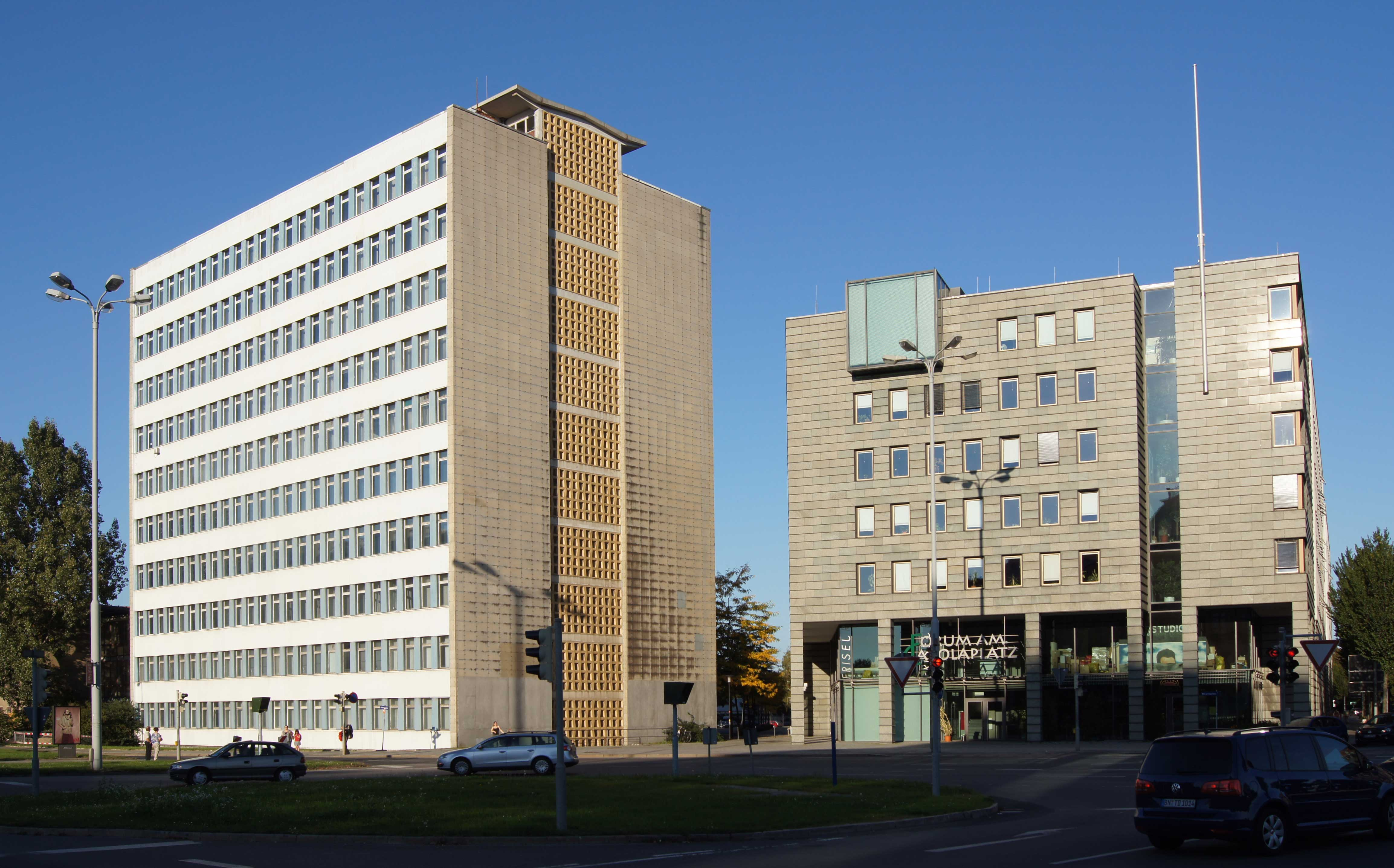 "Blaues Haus" am Carolaplatz 2011